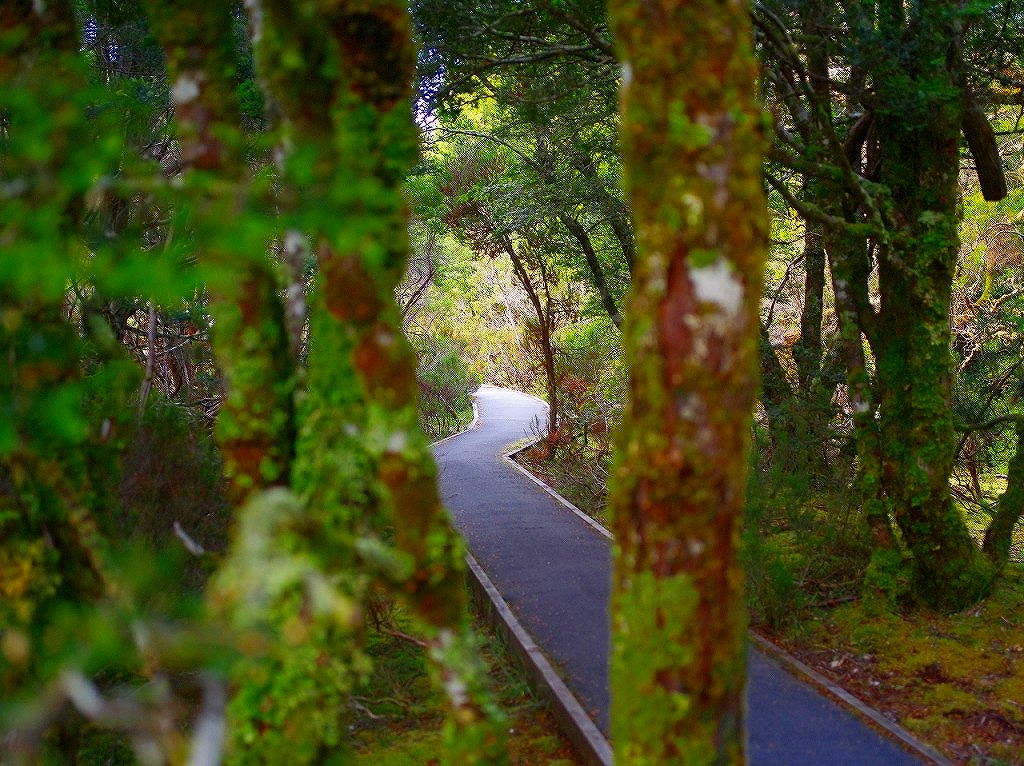 クレイドル山国立公園 エンチャンテッド･ウォーク 130202_7212